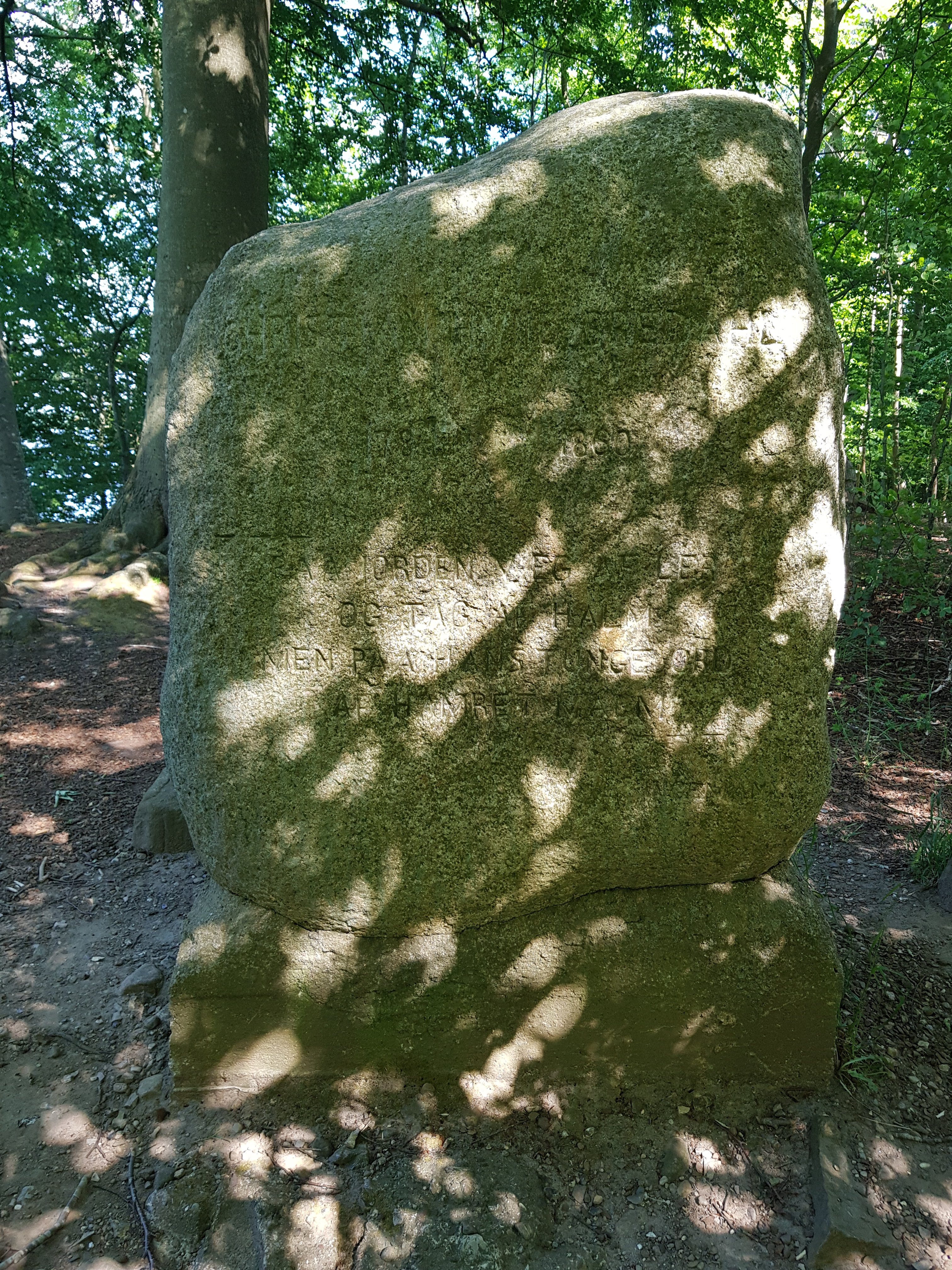 Stenen står ved søbredden ved Parnasgården på Parnasvej, Sorø. Indskription: Christian Hviid Bredahl 1784 1860 Paa jorden væg af ler Og tag af halm Men paa Hans tunge ord Af hamret malm Ingemann